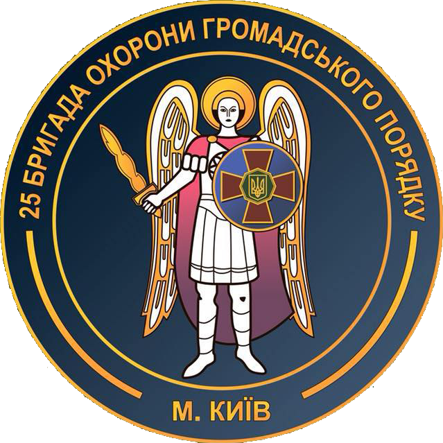 Нарукавний знак, 25 окрема бригада охорони громадського порядку